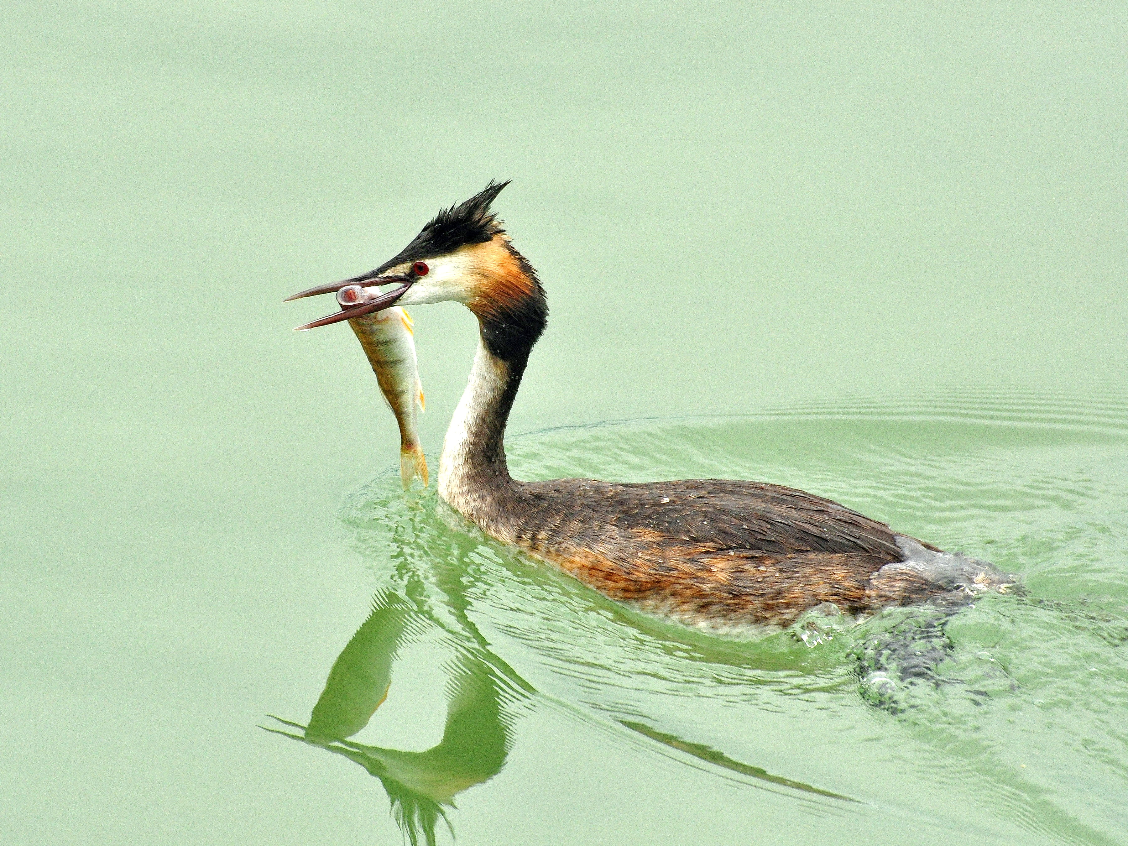 Podiceps cristatus on Obersee (upper Lake Zürich) respectively Seedamm and the wooden bridge (Holzbrücke) between Hurden and Rapperswil in Switzerland